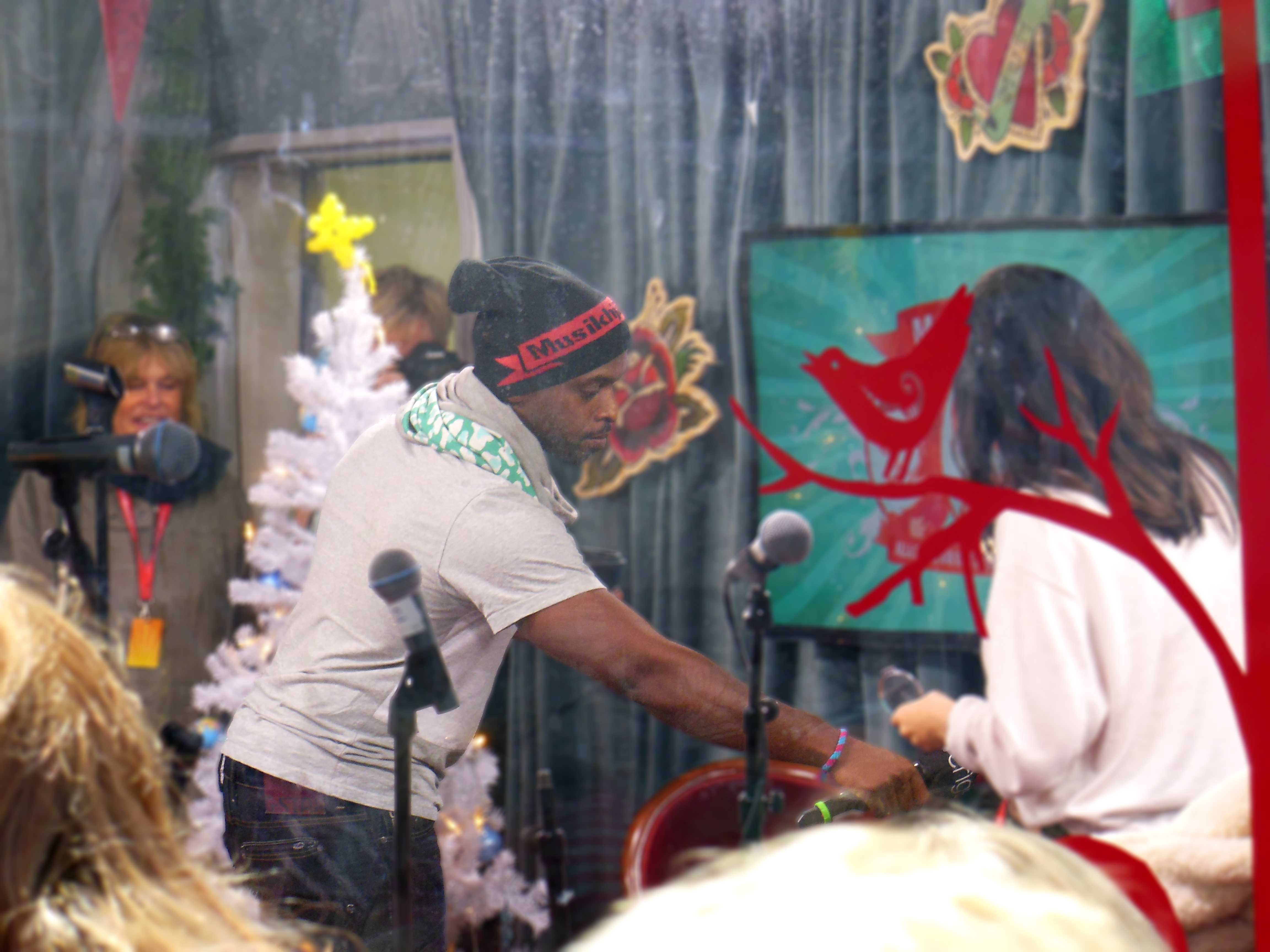 Kodjo Akolor i glasburen under Musikhjälpen 2013.